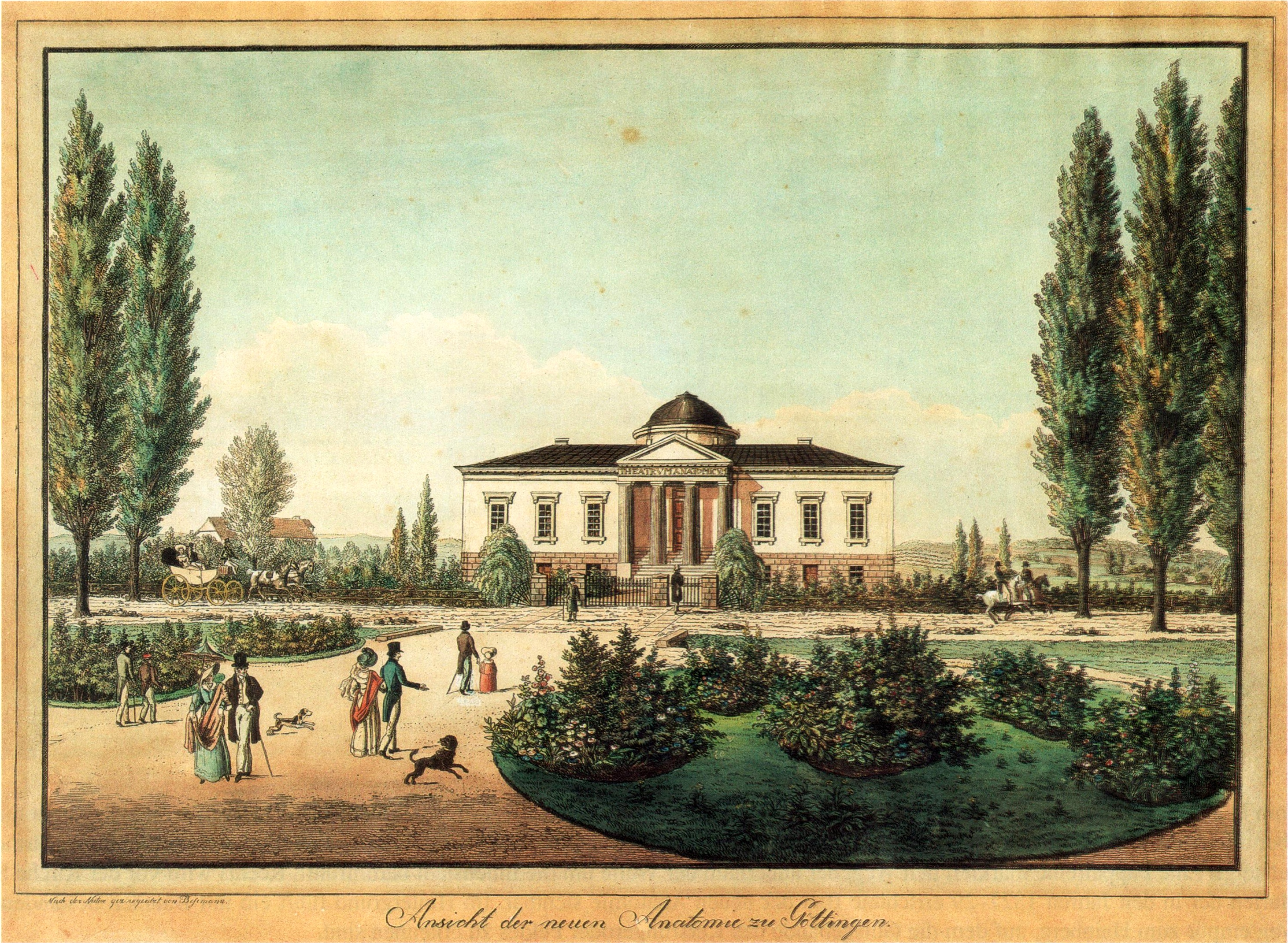 "Ansicht der neuen Anatomie zu Göttingen.". Blick von Osten vom Alleetor (heute Goetheallee) auf den 1827–29 errichteten klassizistischen Neubau der Anatomie; Architekten: Universitätsbaumeister Justus Heinrich Müller (1783–1825) und Otto Praël (1793–1862). Der anatomische Leersaal an der Gebäuderückseite war flach überkuppelt. Heute befindet sich hier die Berliner Straße, das Gebäude wurde bei einem Bombenangriff am 7. April 1945 zerstört. Kolorierte Radierung, Nach der Natur gez. u. geätzt von FBesemann.